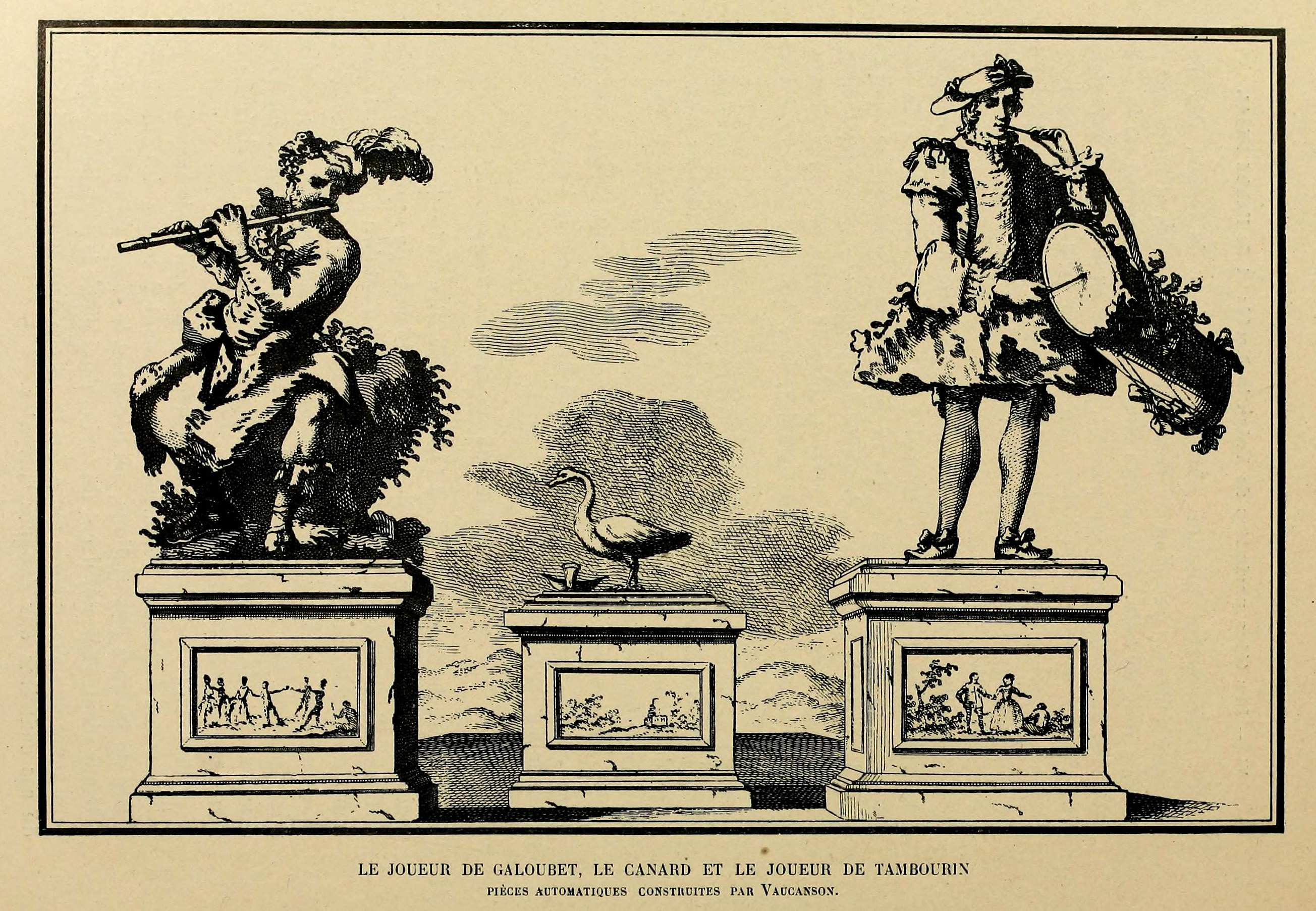 Illustration from Histoire des jouets